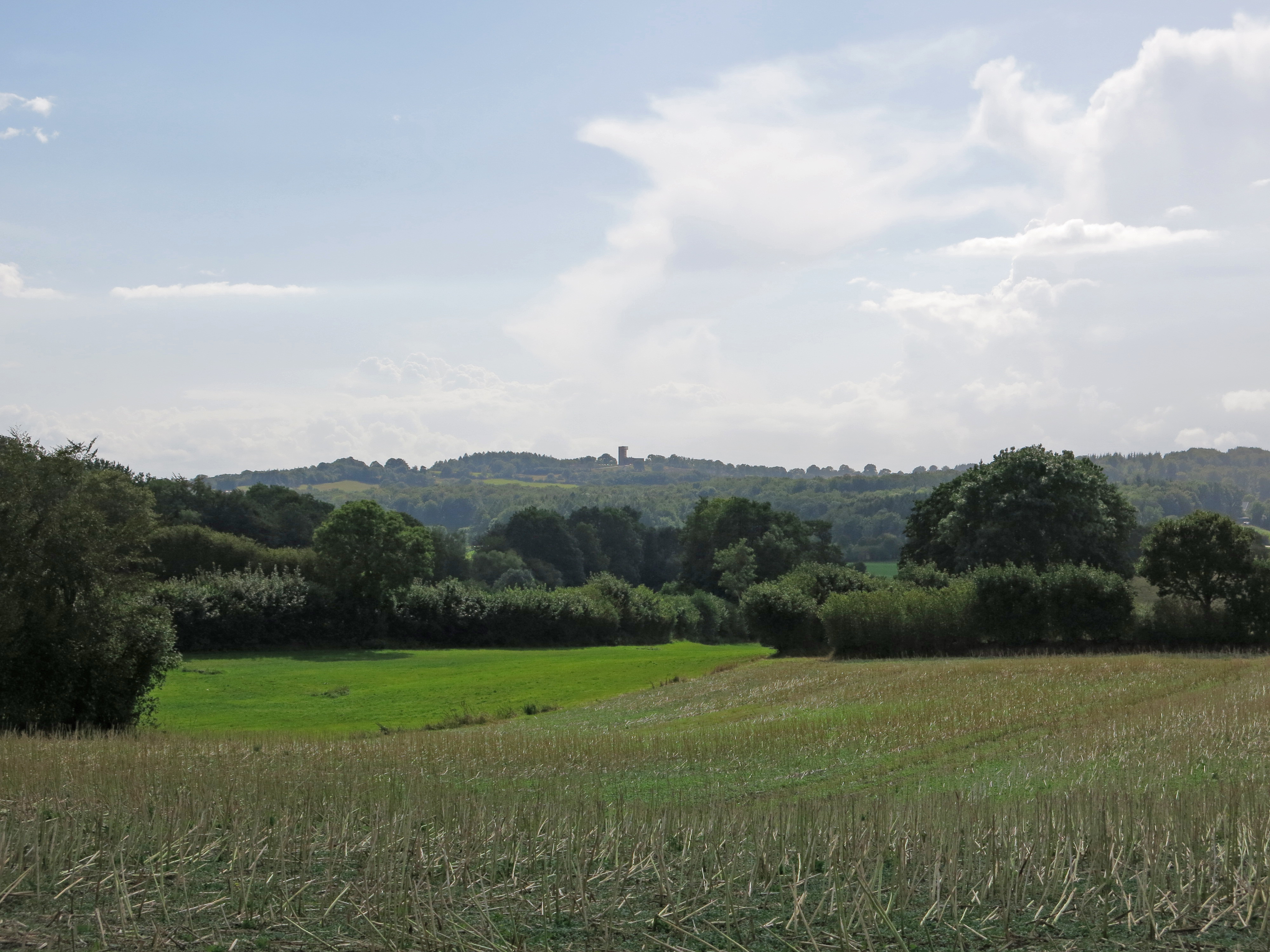 Der Aschberg von Nordosten.